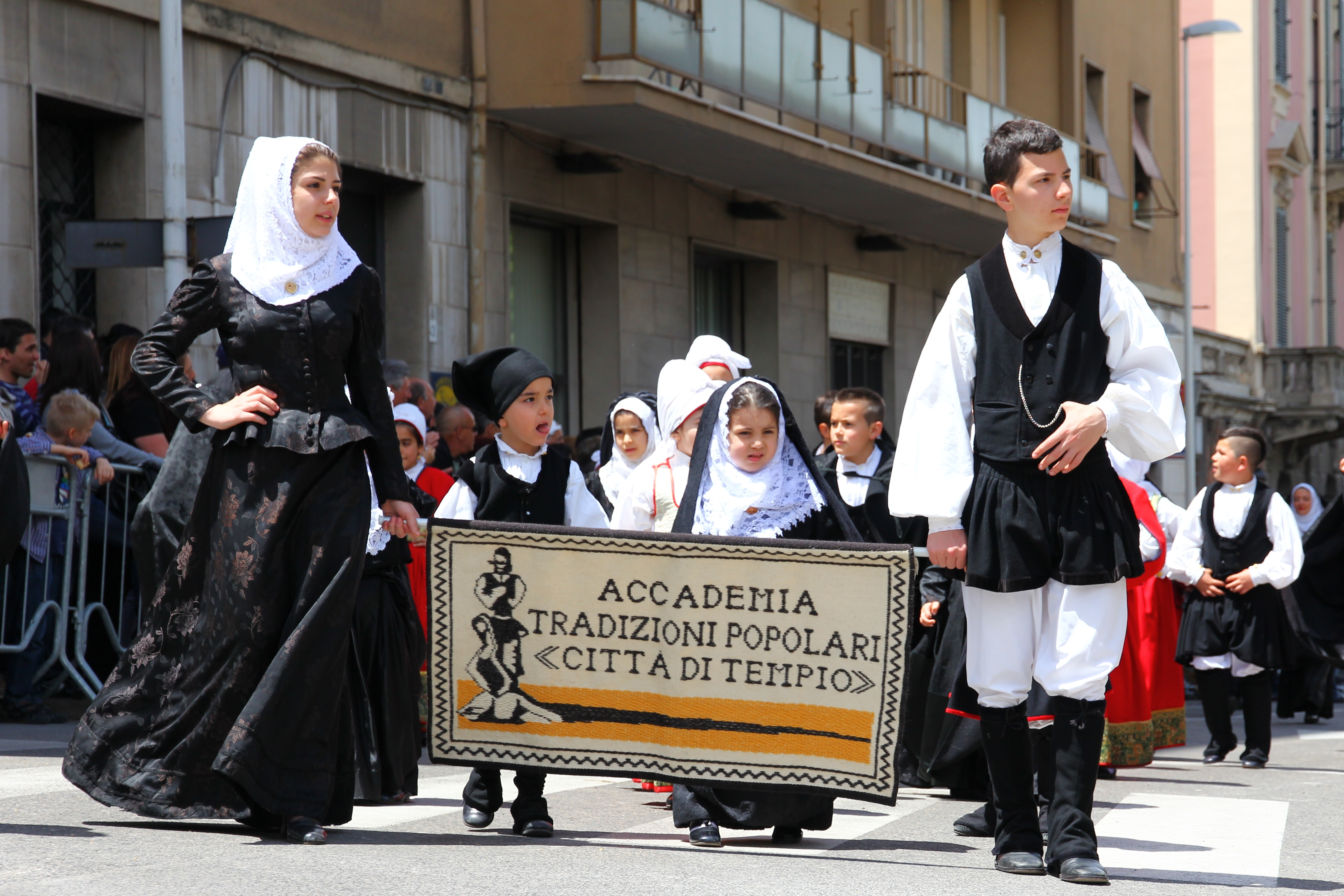 Cavalcata Sarda 2013 (Sassari)